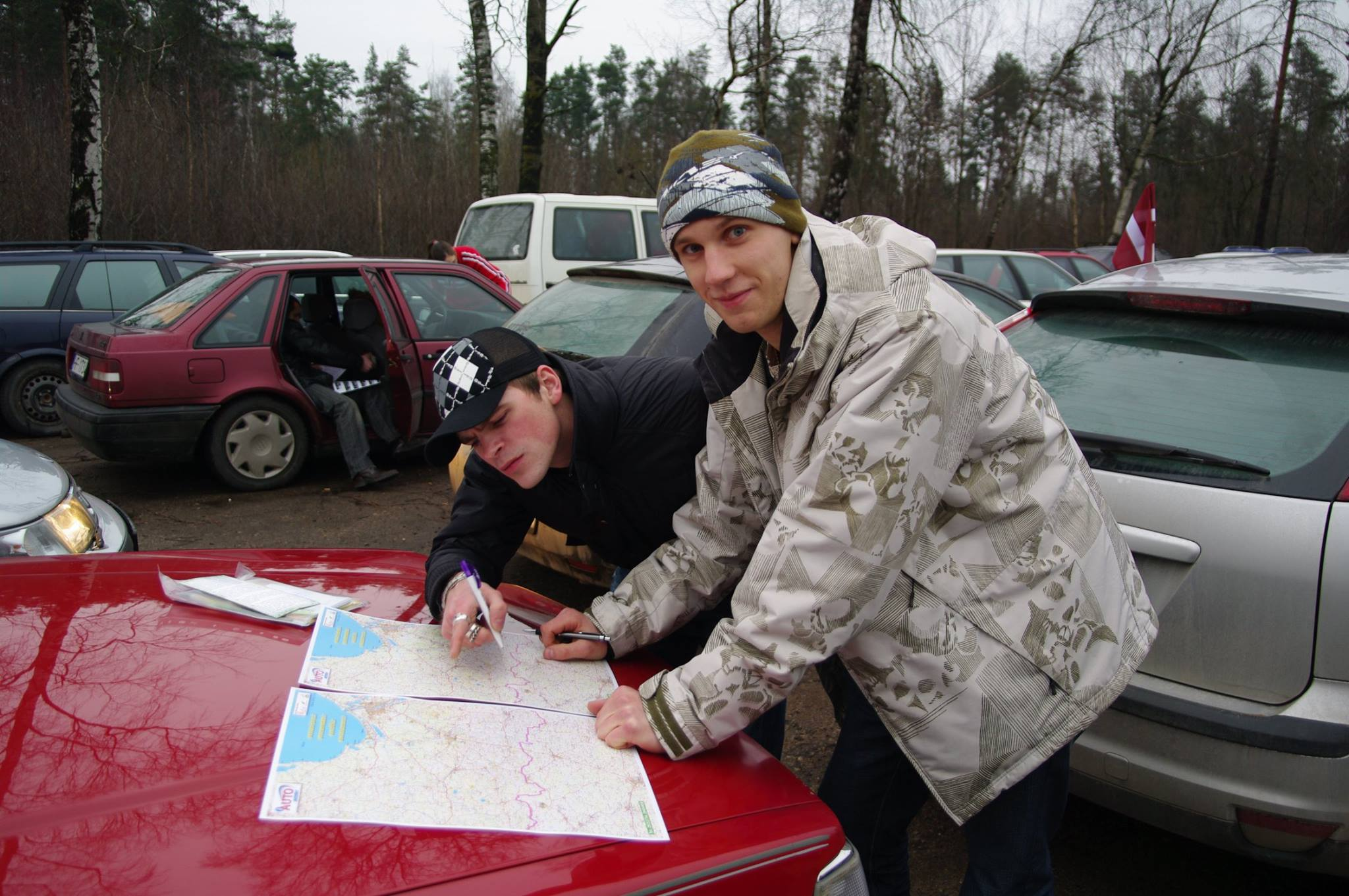 Vieni no pirmo autofotoorientēšanās sacensību dalībnieki.